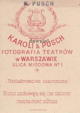 Rewers zdjęcia z zakładu M.Pausch - Fotografia Teatrów w Warszawie